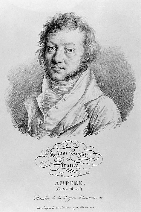 Ampère, André Marie Physiker, Porträt Als Mitglied der Légion d'honneur. Lithografie von Jules Boilly.